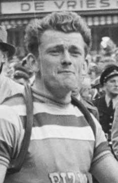 Ronde van Nederland Rizla (internationaal)